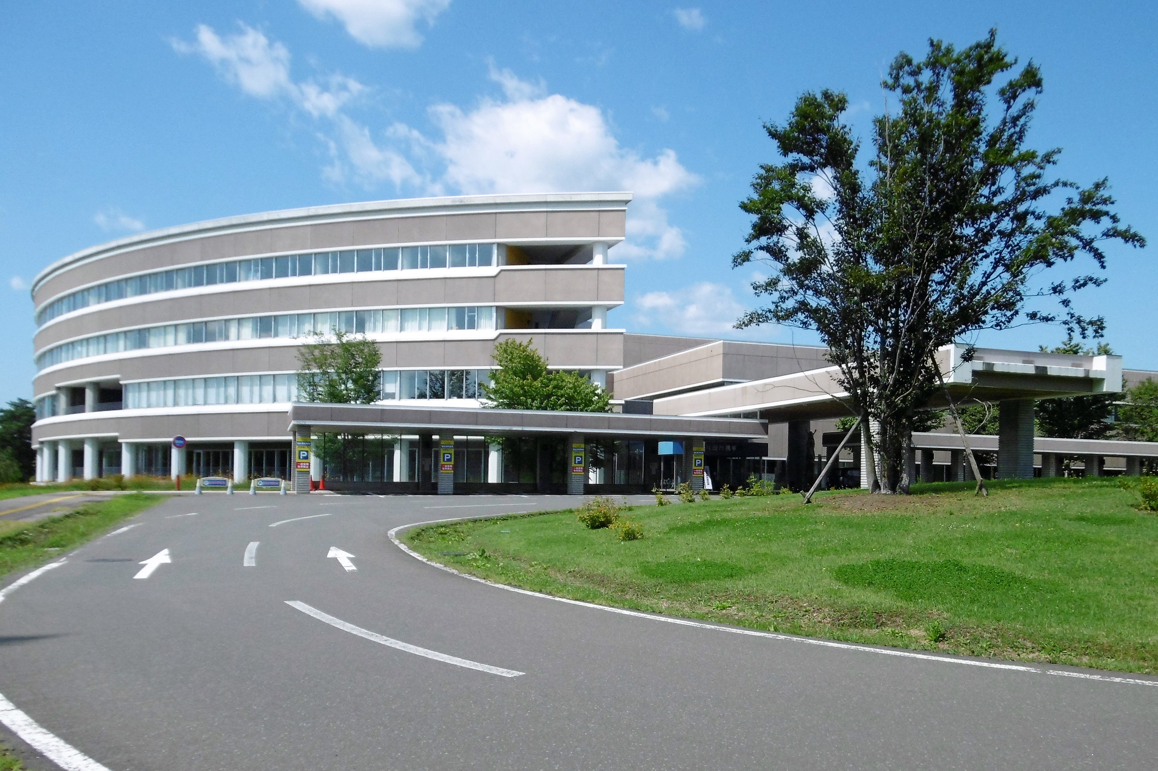 北秋田市民病院：秋田県北秋田市